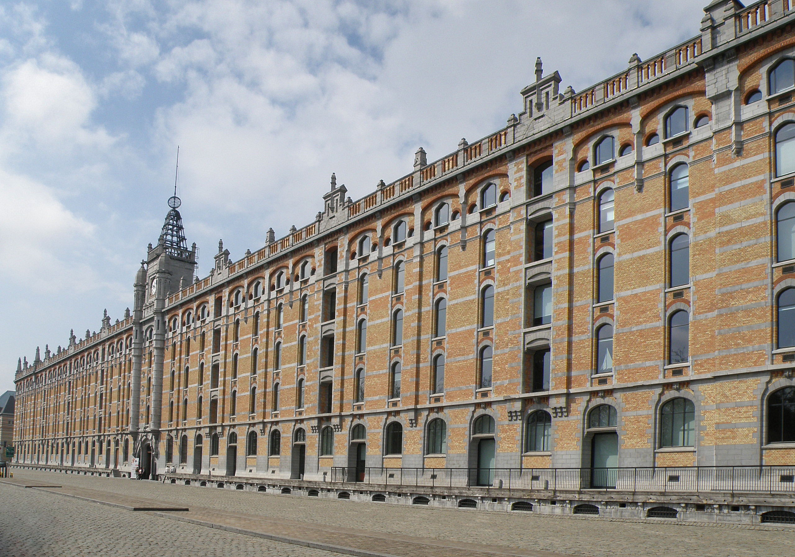 Bruxelles, Belgique. Site de Tour et Taxis (en néerl. Thurn en Taxis), situé avenue du Port, le long du canal de Bruxelles. Façade de l’Entrepôt royal, construit entre 1904 et 1907 selon les plans de l’architecte Ernest Van Humbeek.